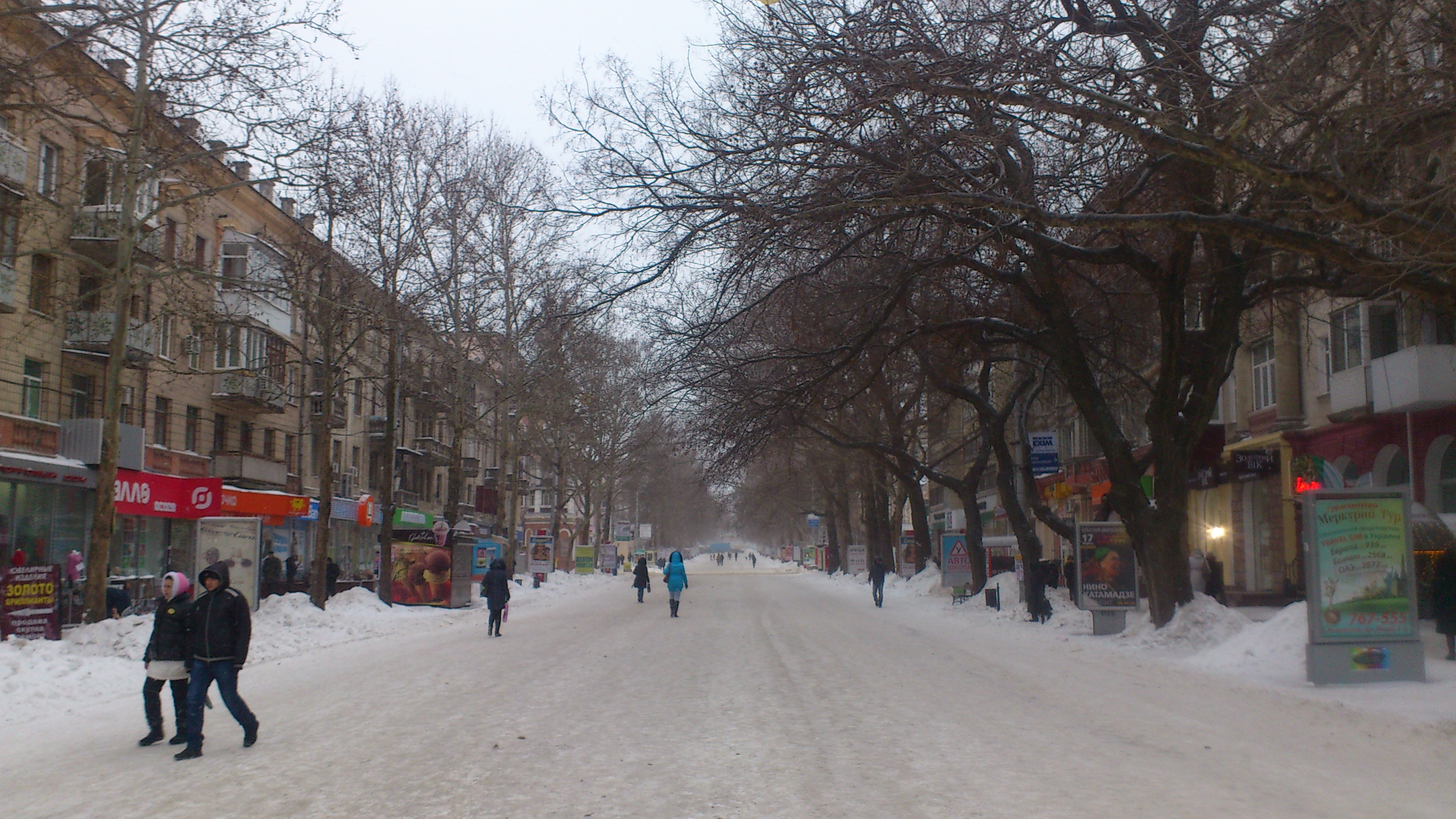 Вулиця Соборна в Миколаєві взимку